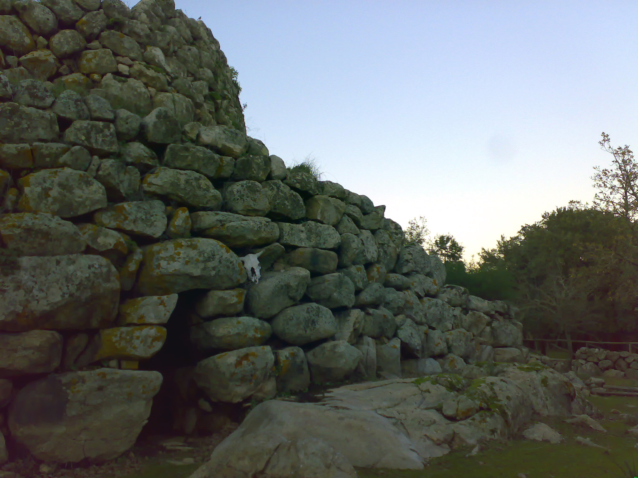 Ingresso Nuraghe in Località "Sa Serra", Orotelli, Sardegna